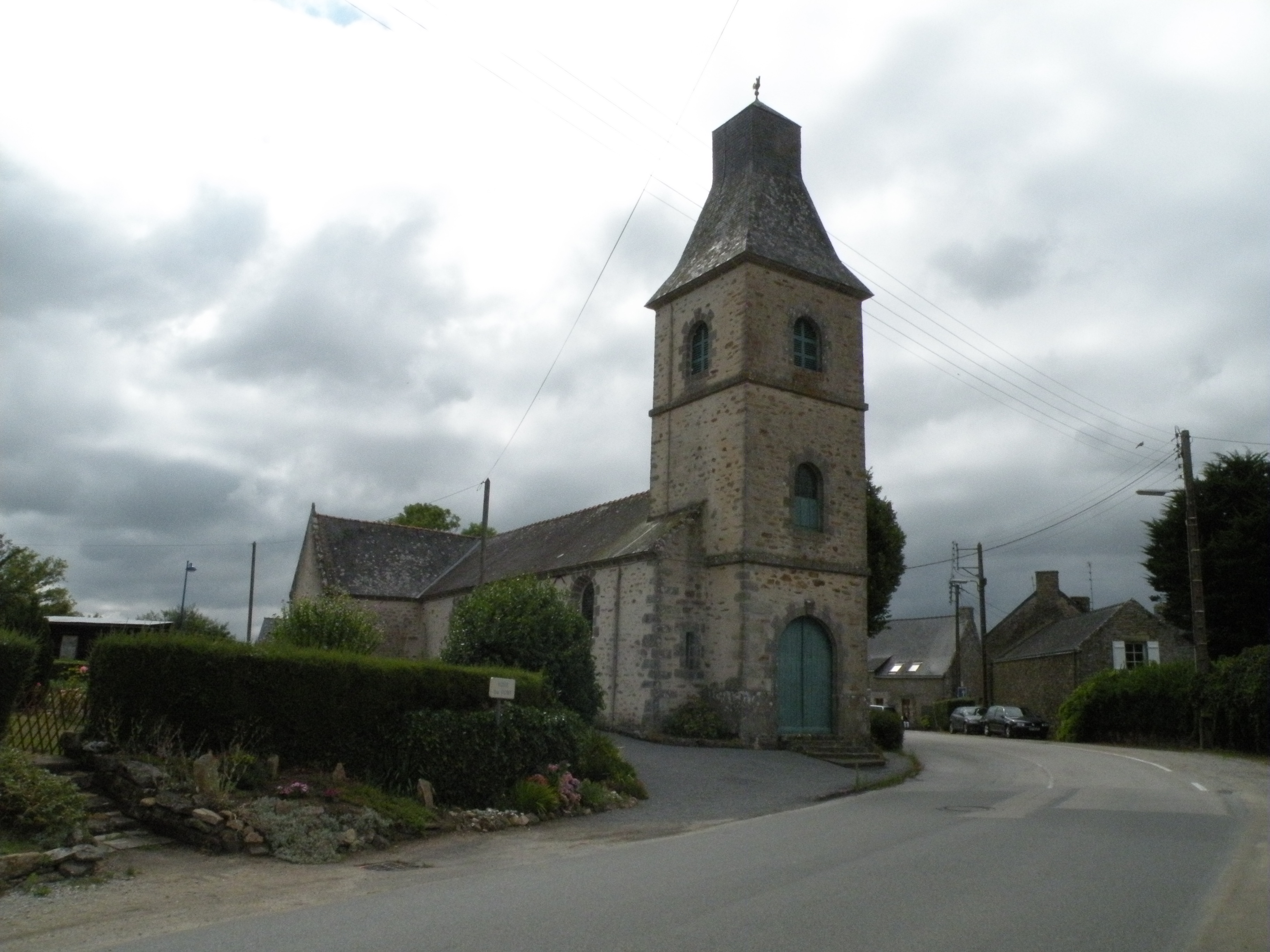 Clocher de l’église de Noyalo.